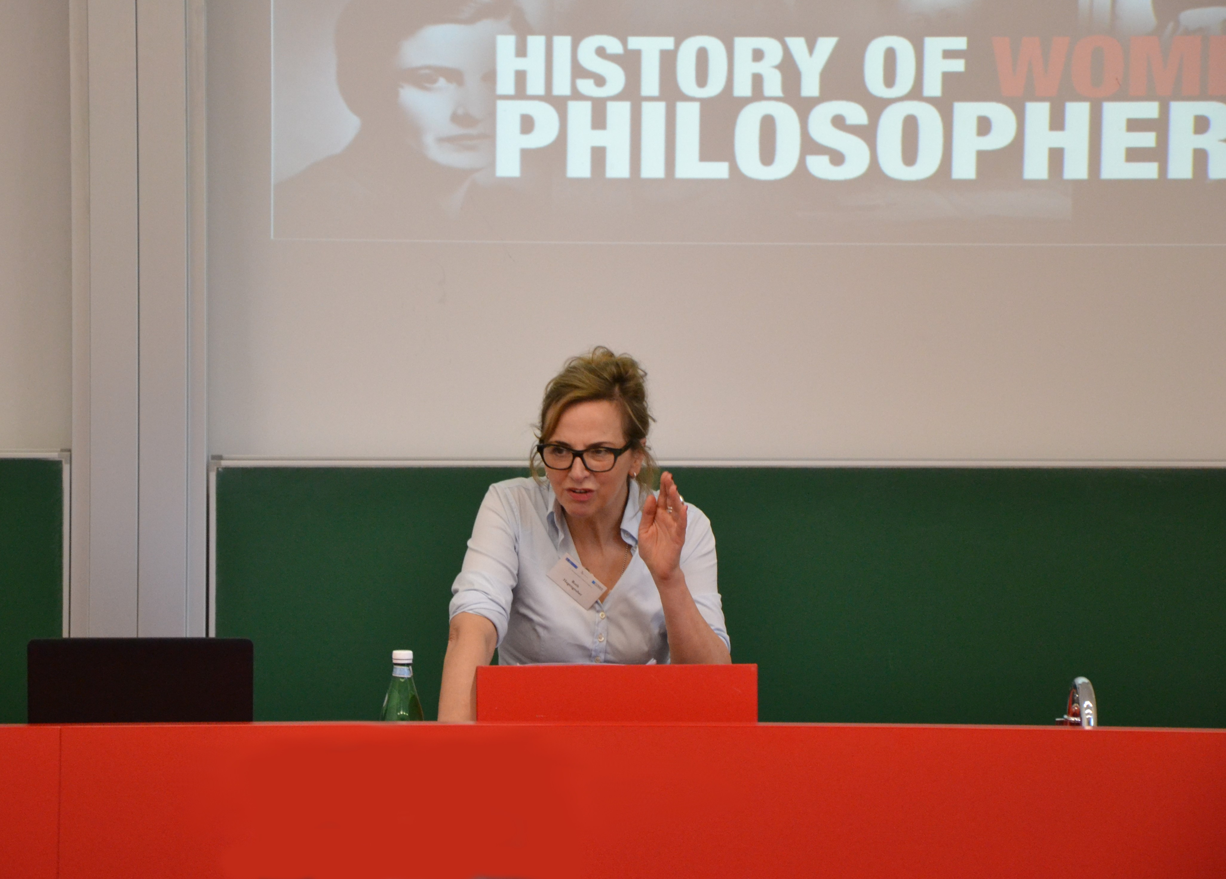 Prof. Ruth Hagengruber (X. Leibniz Kongress 2016, Hannover)